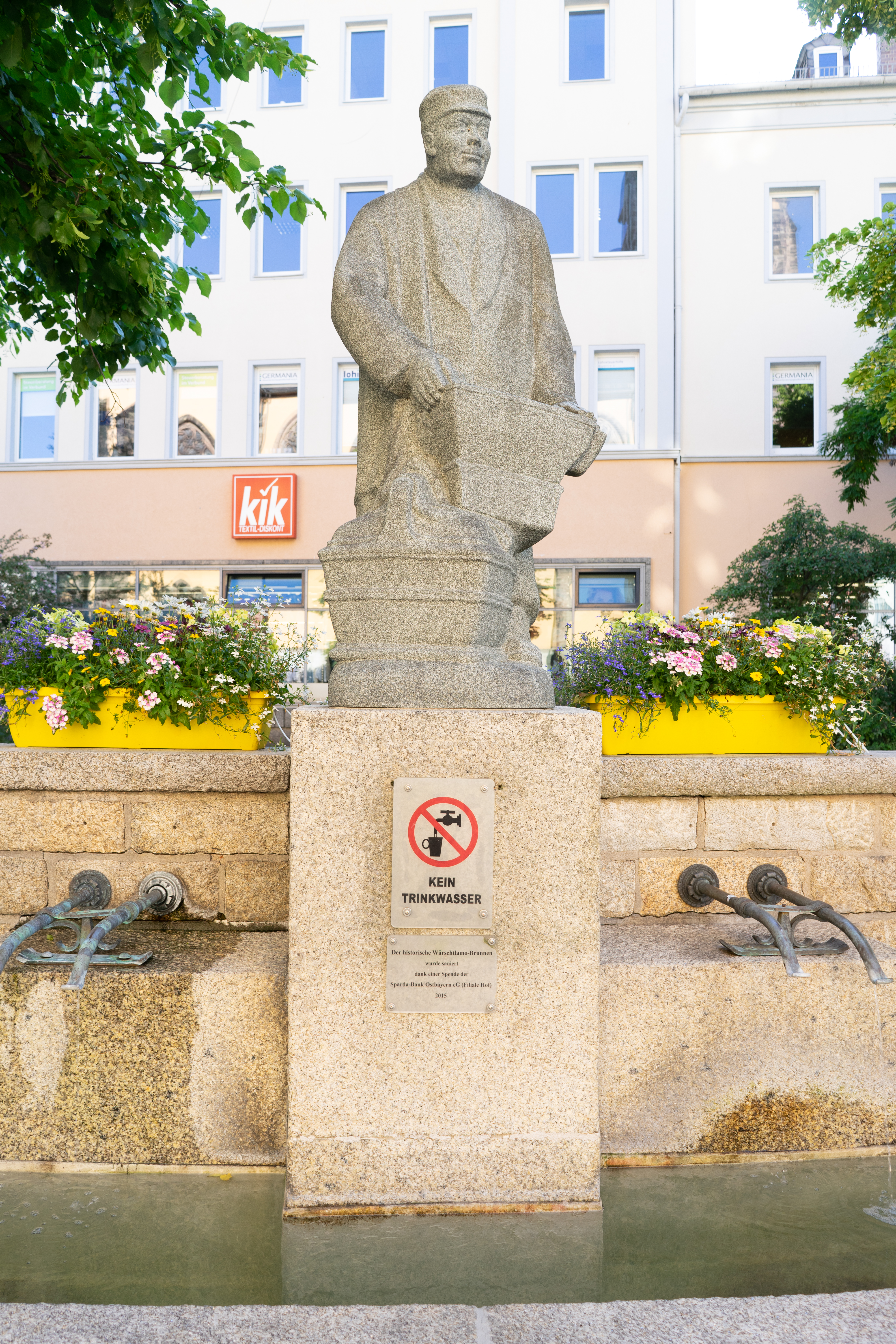 Statue des Wärschtlamo an der Kirche St. Marien.